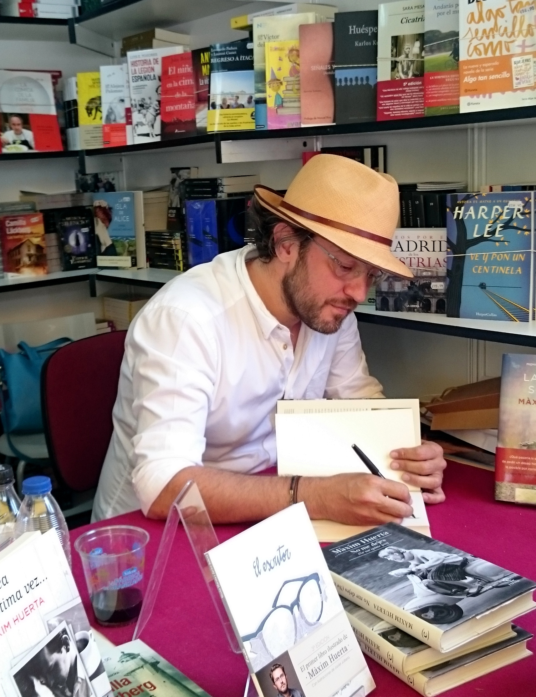 Màxim Huerta en la Feria del Libro de Madrid de 2016